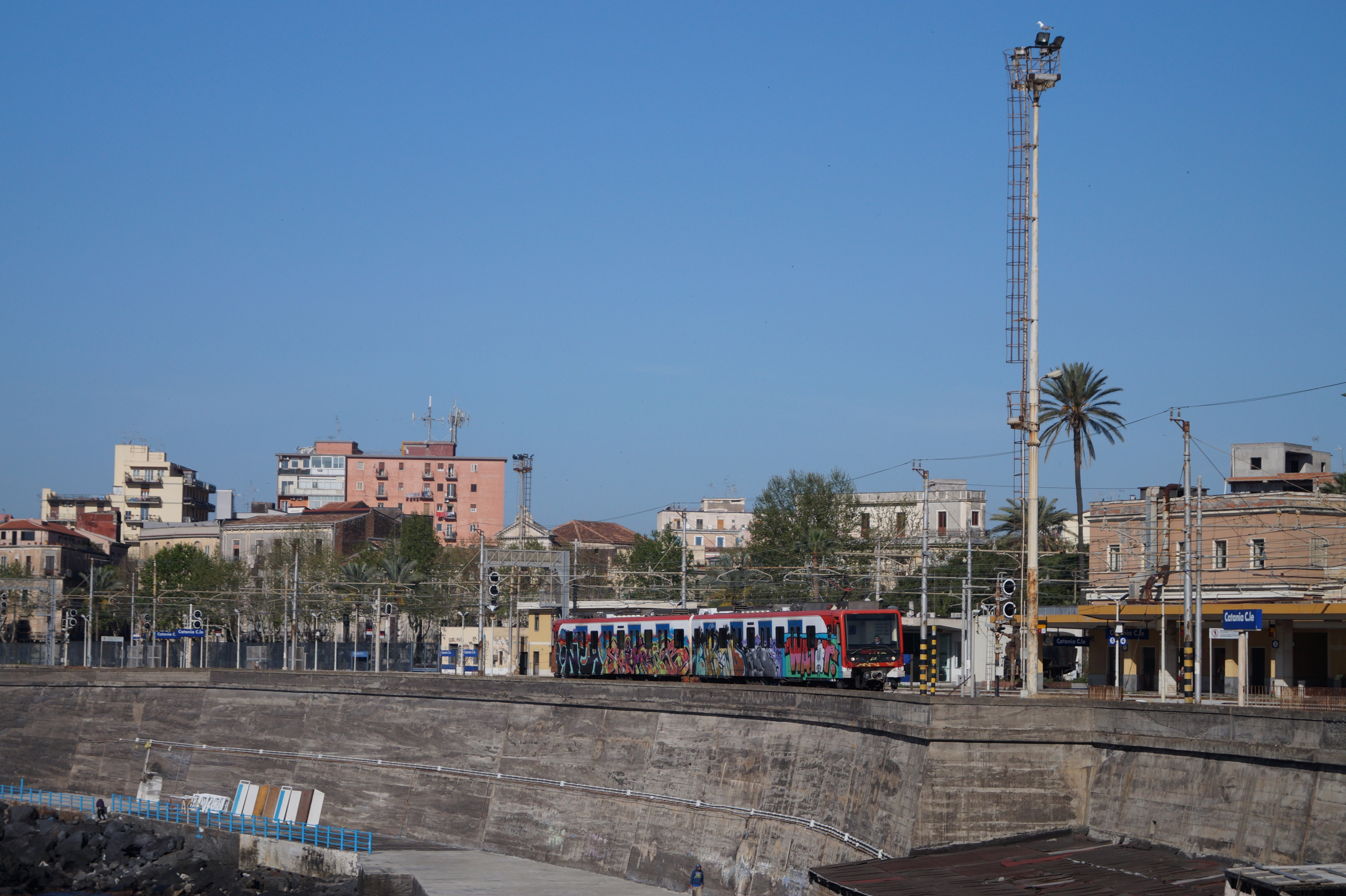 Metro kurz vor dem Erreichen des Bahnhofs Stazione FS